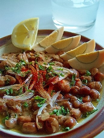 Ful medames - Egyptian cuisine